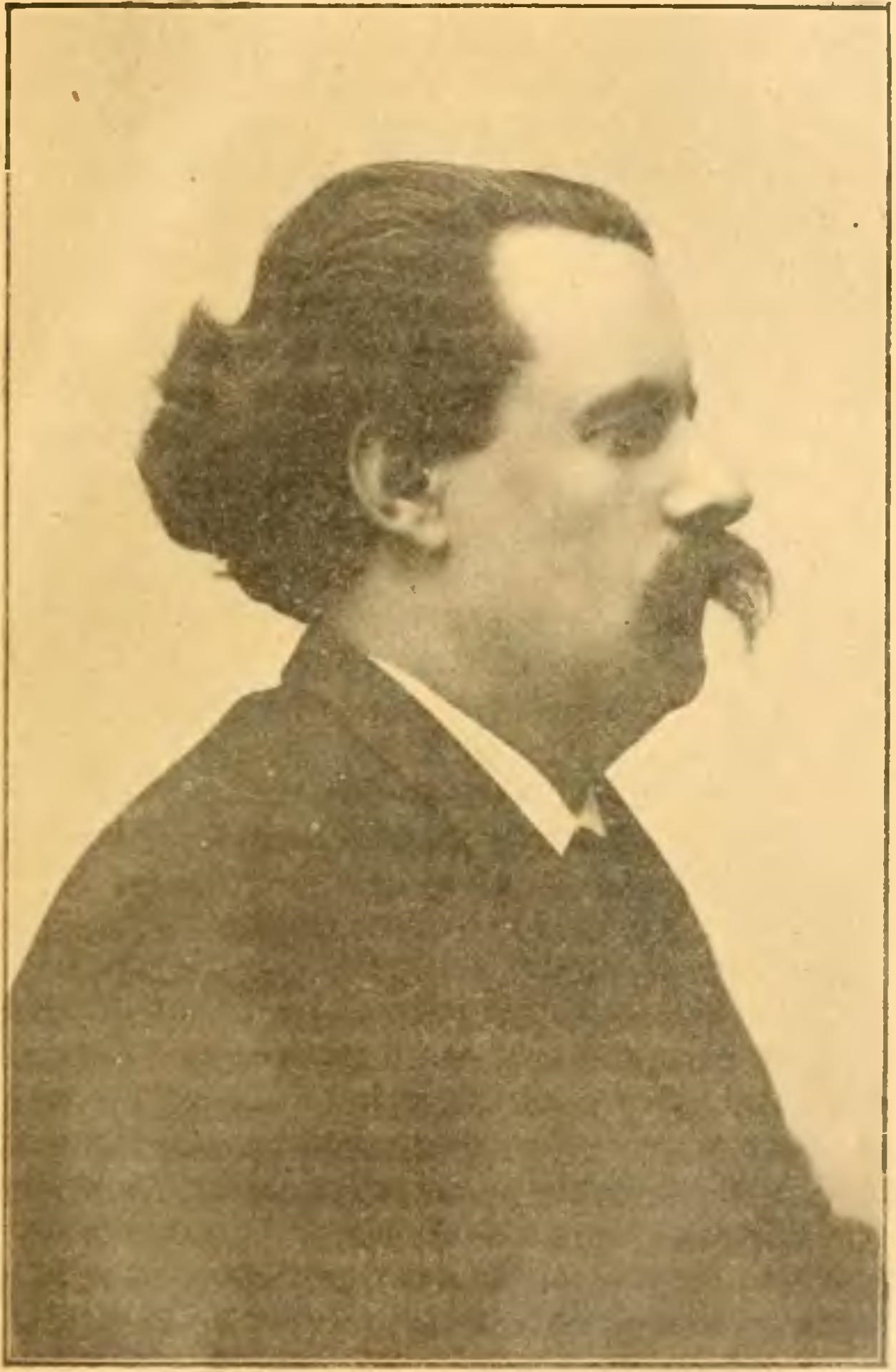 Photograph of Jules Joffrin. Illustration from l'Histoire socialiste de la France contemporaine (Vol. XII).